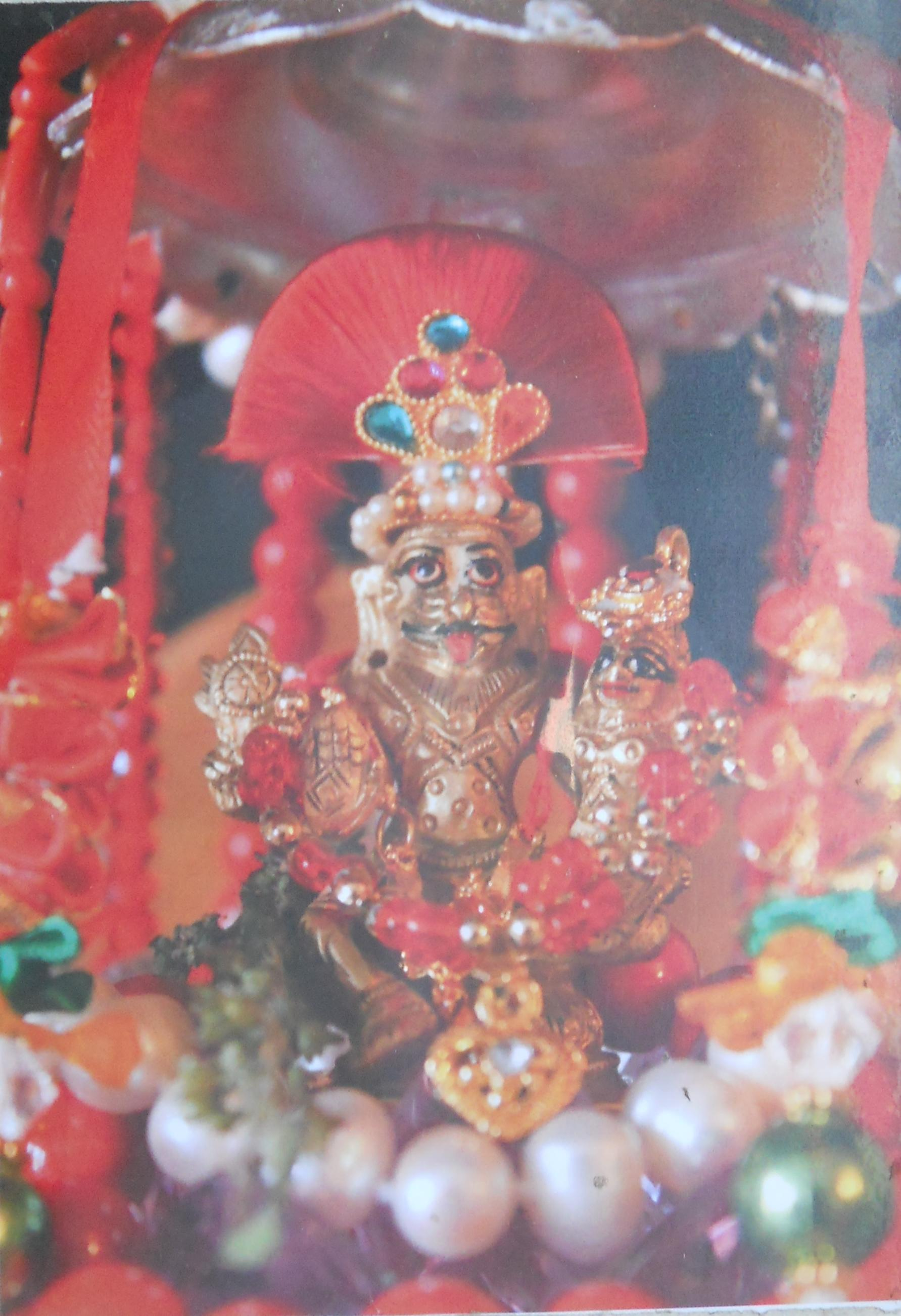 /Прахлад-Нрисимха/ - Мурти из храма